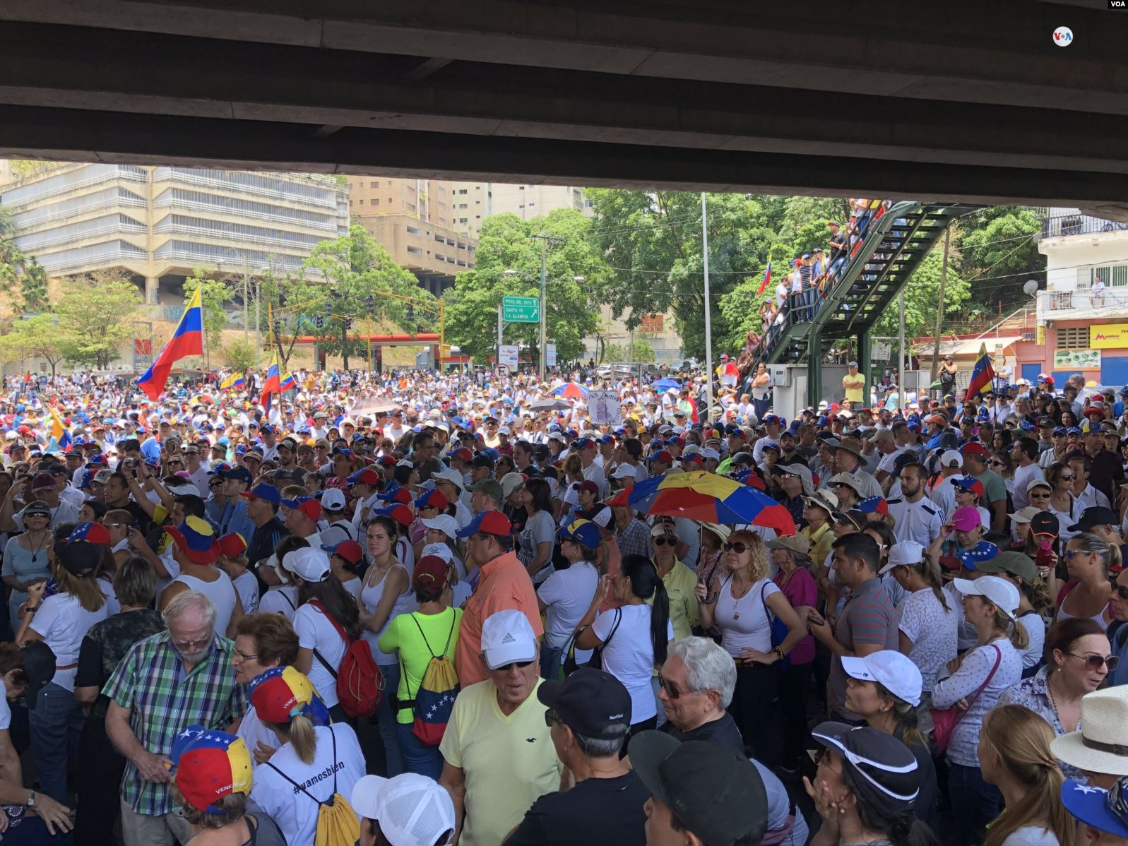 Operación libertad, 1 de mayo en Caracas, Venezuela, 2019.